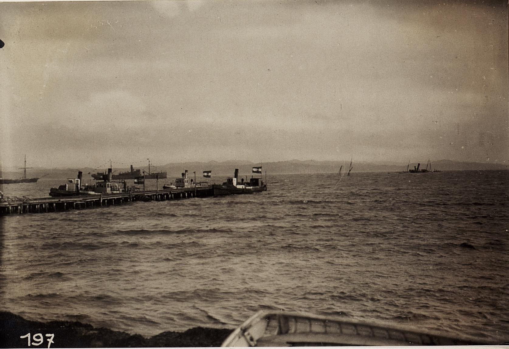 Molo von Durazzo mit versenkten Schiffen im Hintergrunde.